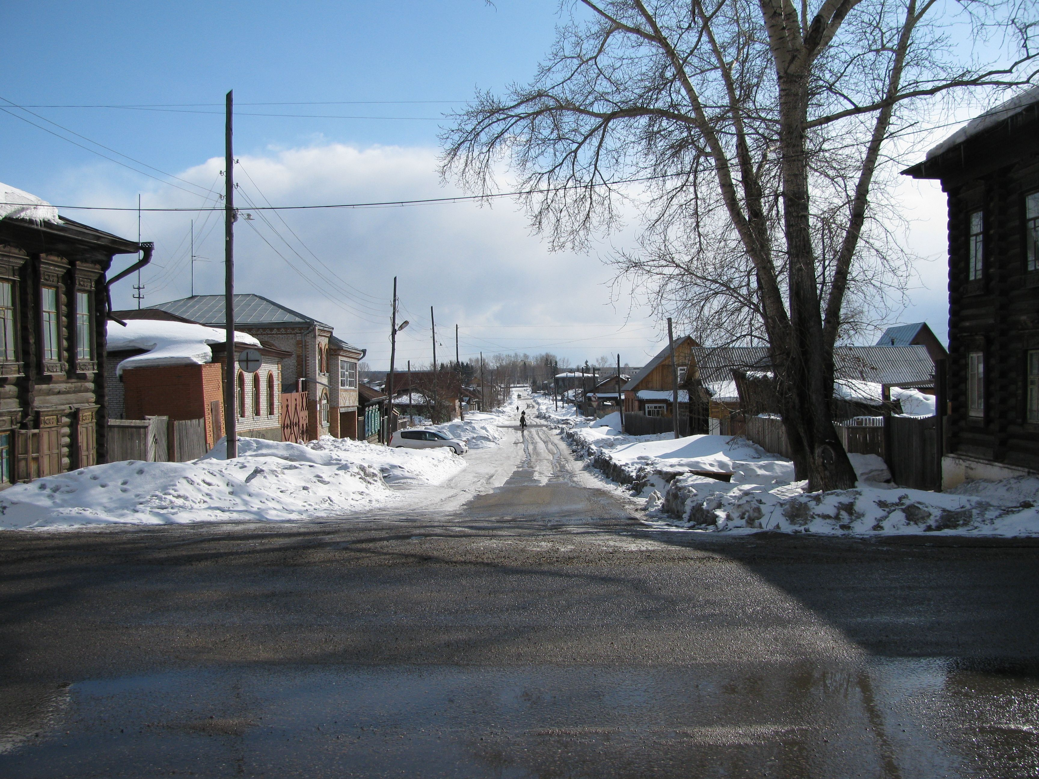 Улицы Енисейска.